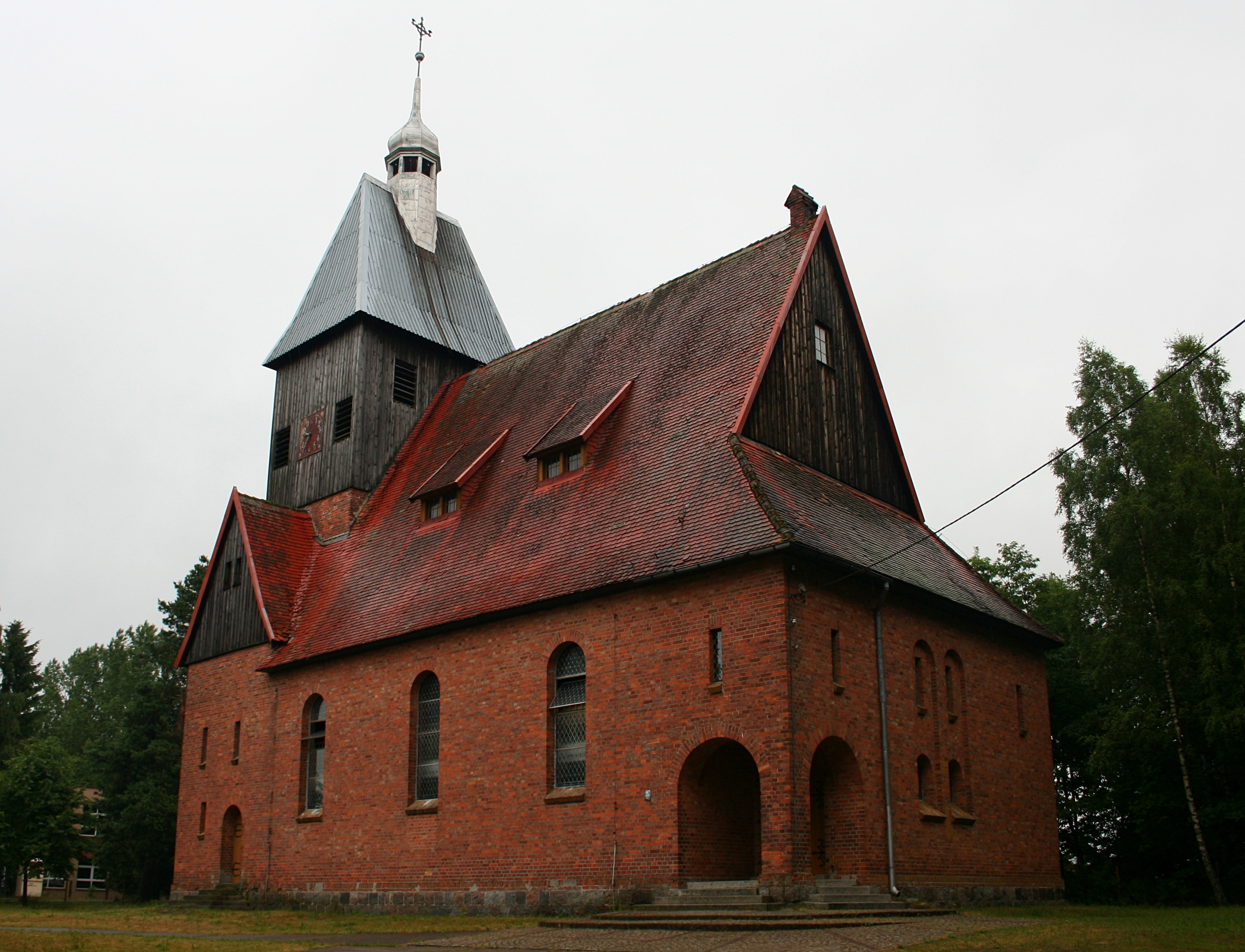 Kościół św. Andrzeja Boboli w miejscowości Rokity, woj. pomorskie